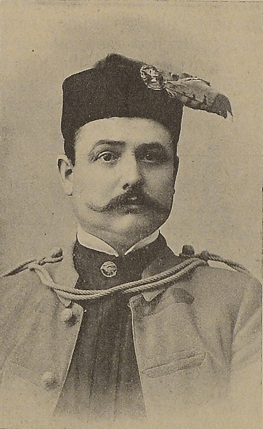 1931 Jan Galicz